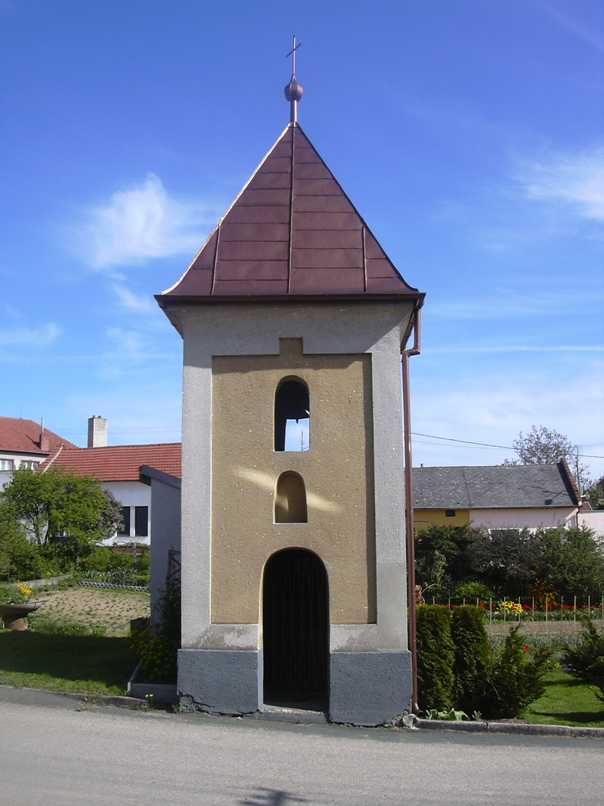 zvonička Zelená Hora (Vyškov- Czech republic)